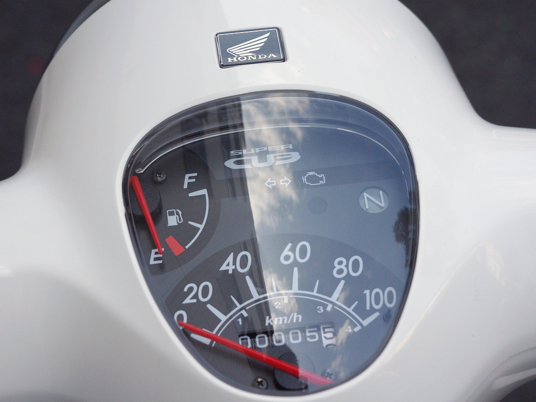 Honda SuperCub 110 instruments